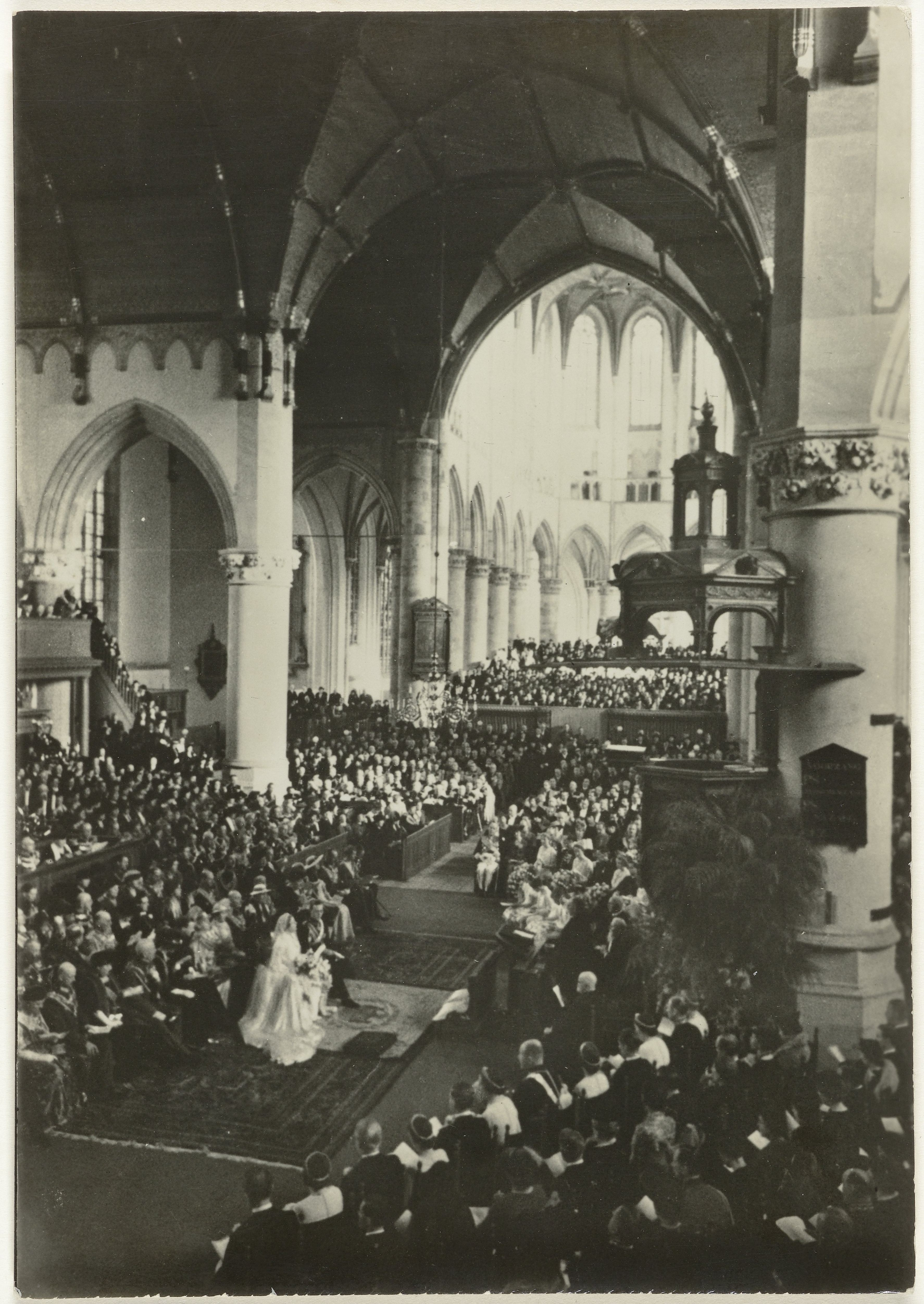 Inzegening van het huwelijk van prinses Juliana en prins Bernhard in de St. Jacobskerk in Den Haag, 7 januari 1937, Erich Salomon, Weekblad Het Leven, 1937. Eén van 10 prentbriefkaarten in een mapje.